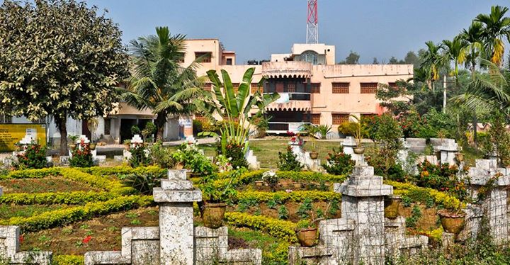 Katwa-I CD Block and Katwa - I Panchayat Samity Building (Part)